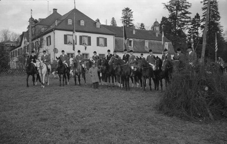 Hubertus-Jagd bei Schloß Auel